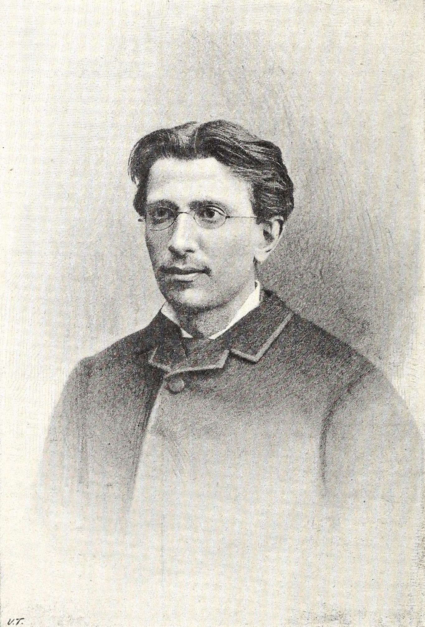 Raffaele Cattaneo (1861-1889), architetto